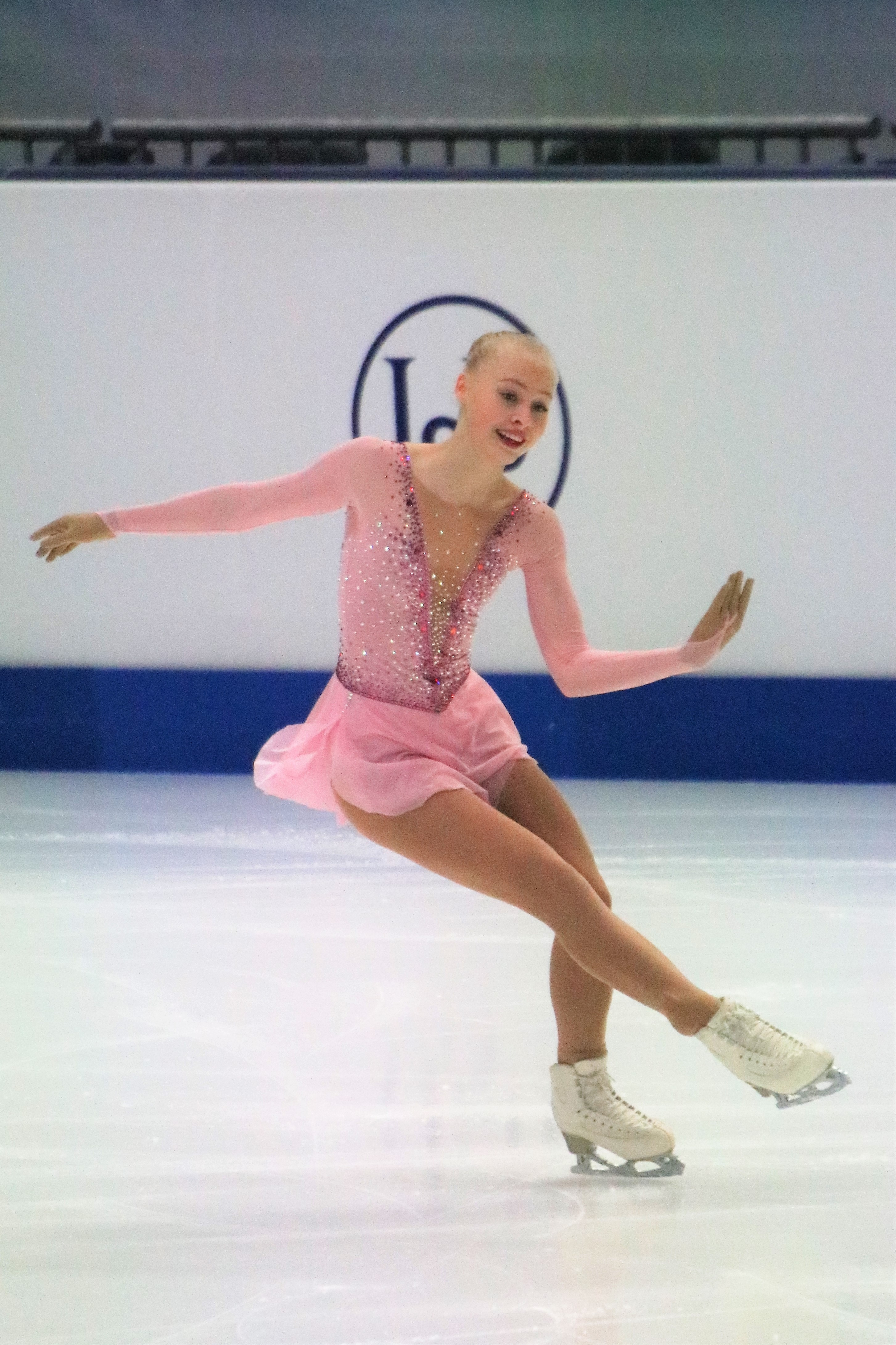 Линнеа Седер (Финляндия) на чемпионате Европы по фигурному катанию 2020